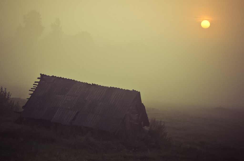 Still, Macionys